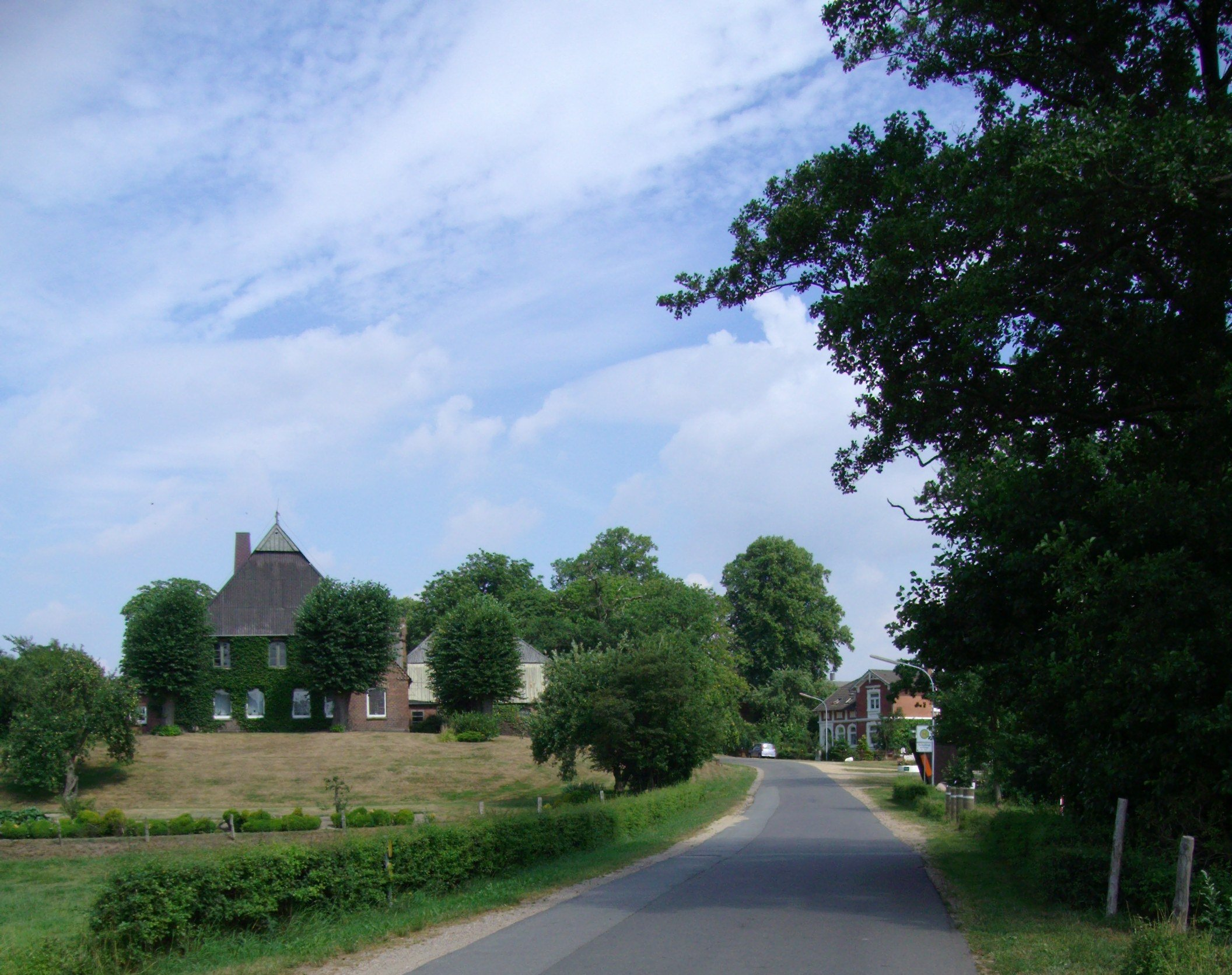 Dorfstraße in Schlotfeld, Kreis Steinburg, Schleswig-Holstein, Germany